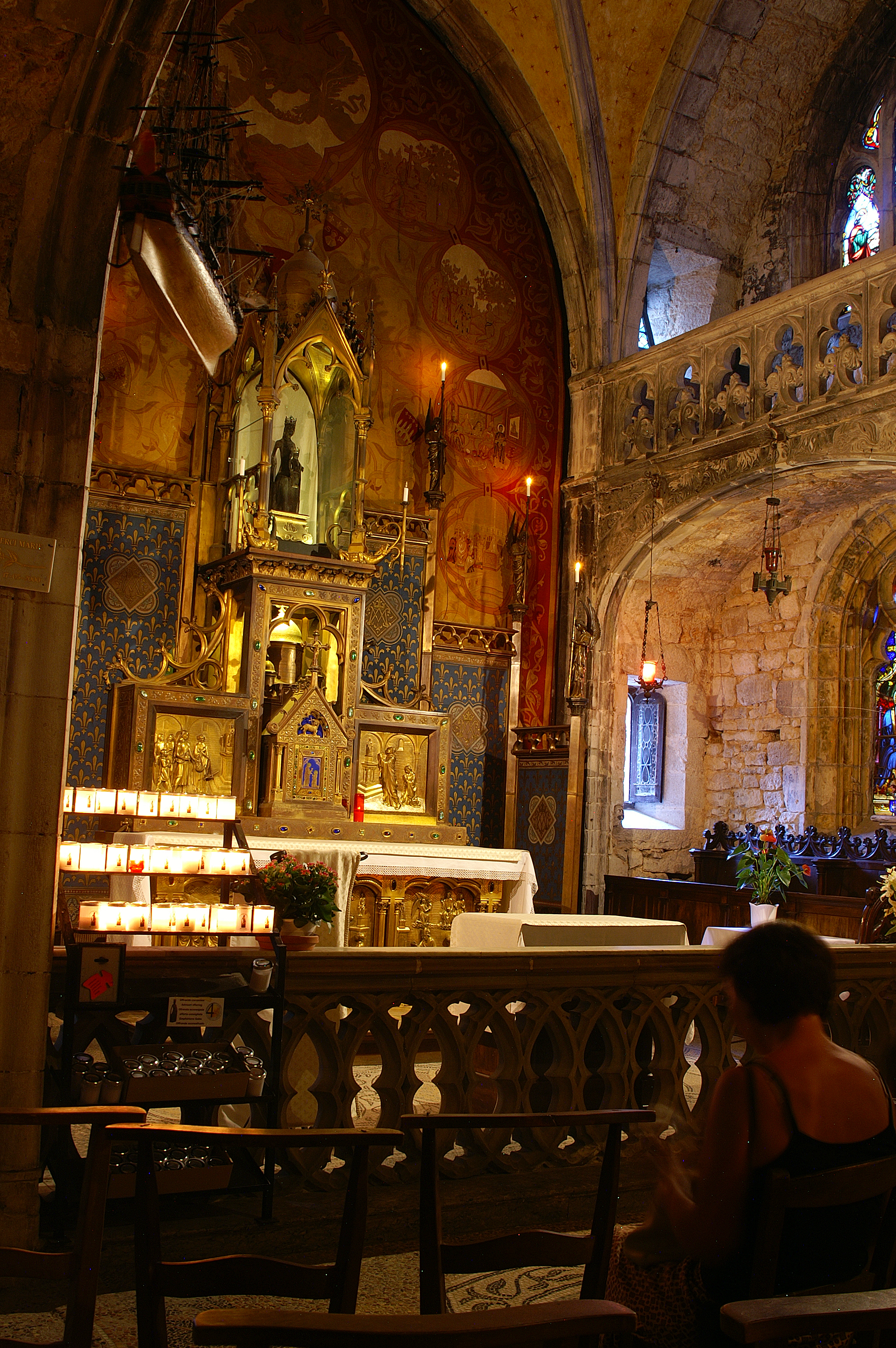 This building is en partie classé, en partie inscrit au titre des Monuments Historiques. .